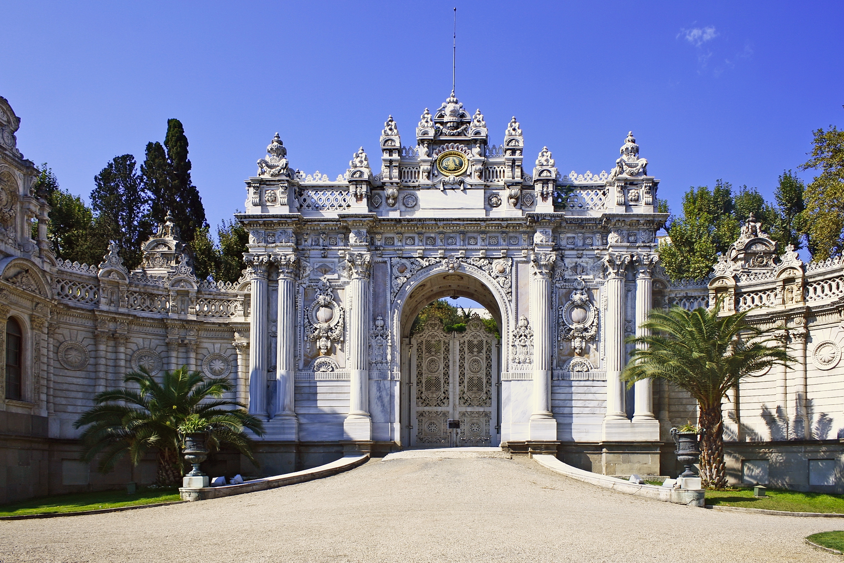 Straßenseitiges Tor des Palastes